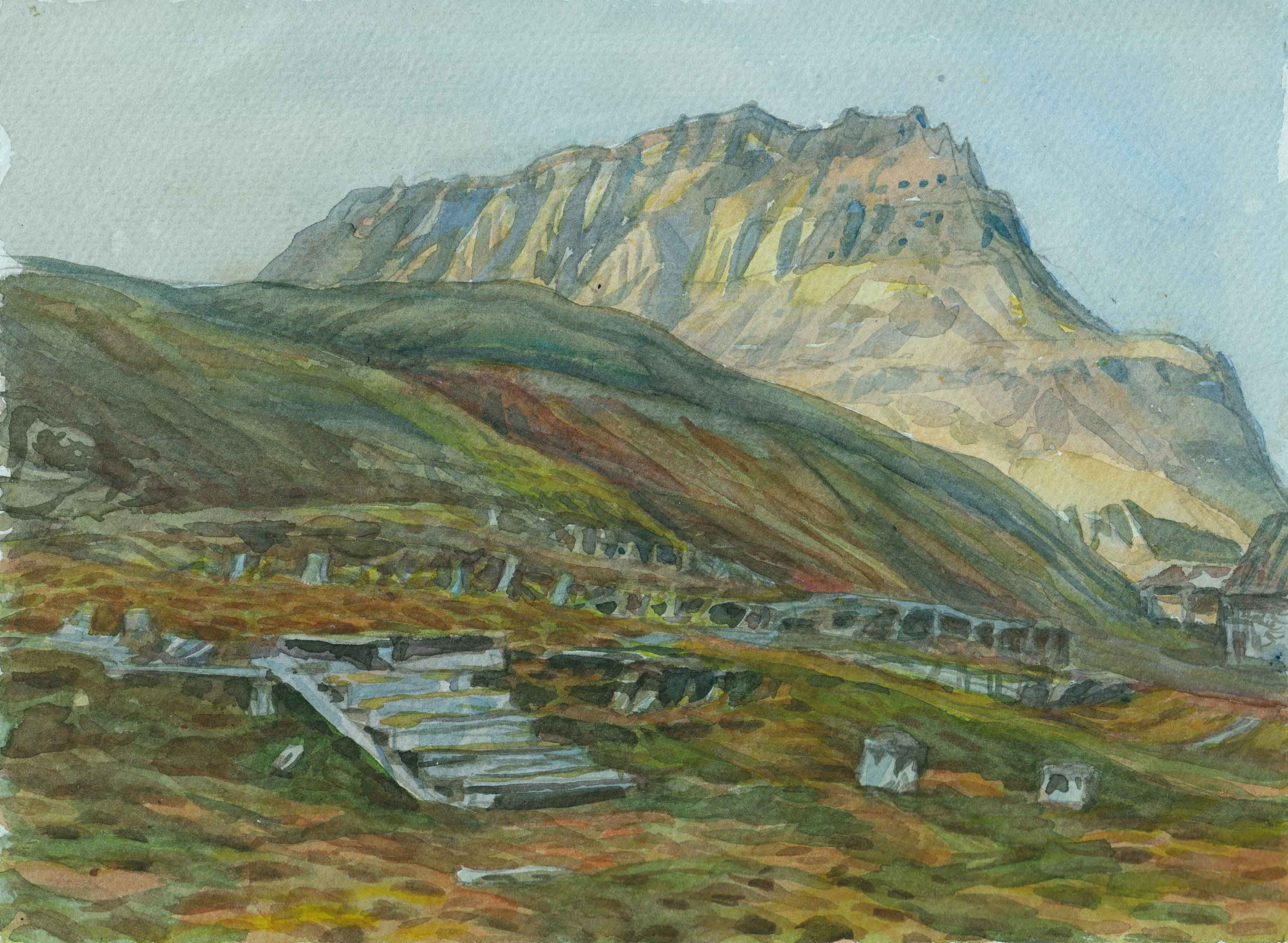 Сделана работа во время участия в международной экспедиции Михаила Малахова "Полярный меридиан. Щпицберген-2014". В настоящее время бывший российский посёлок, образованный около шахт по добыче угля, заброшен, как и сами шахты, из-за истощения угольного пласта.